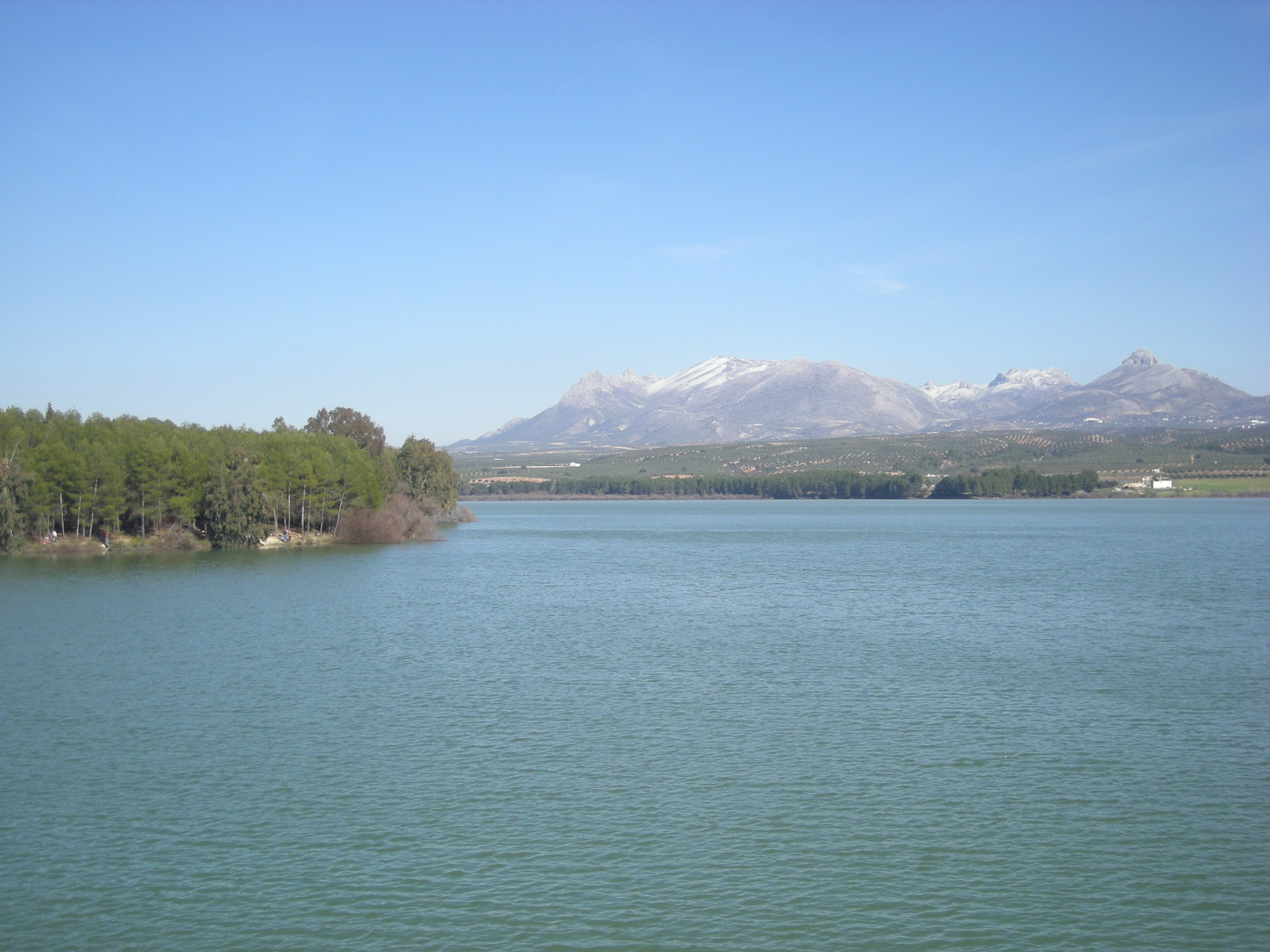 Vista del Embalse del Cubillas.